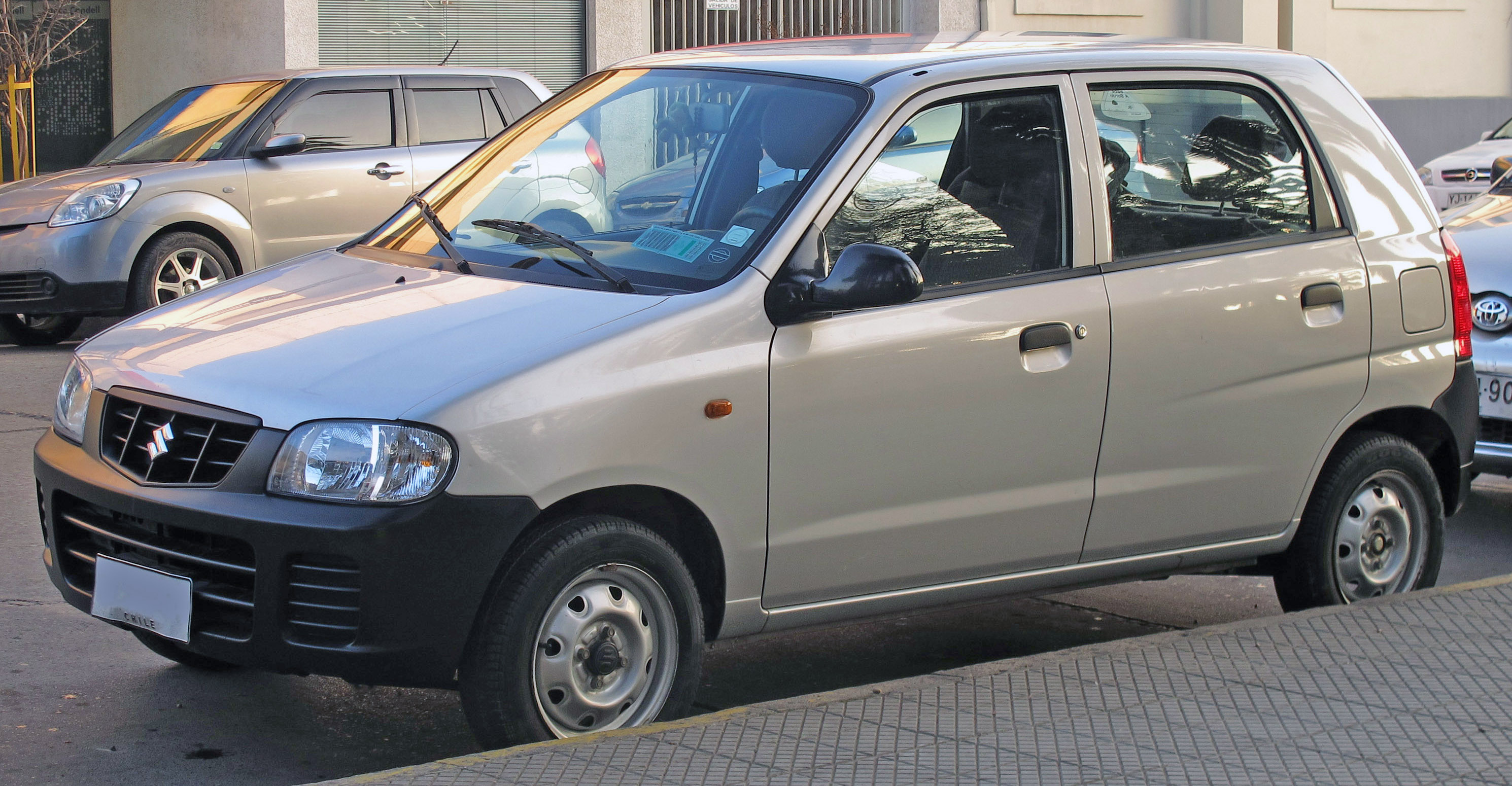 Suzuki Alto 800 GL 2011